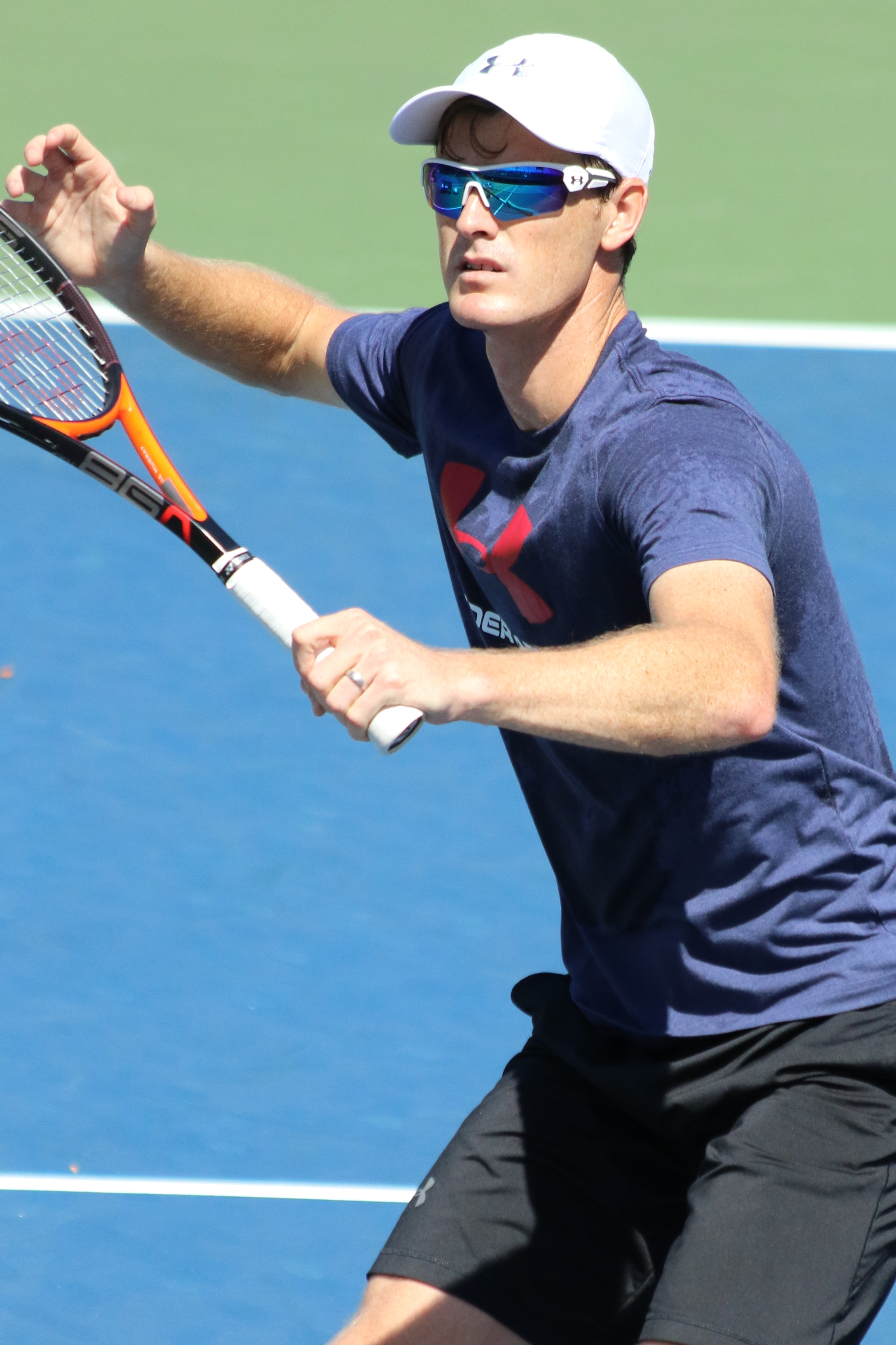 Murray J. US16 (14)